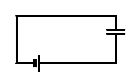 직류회로도